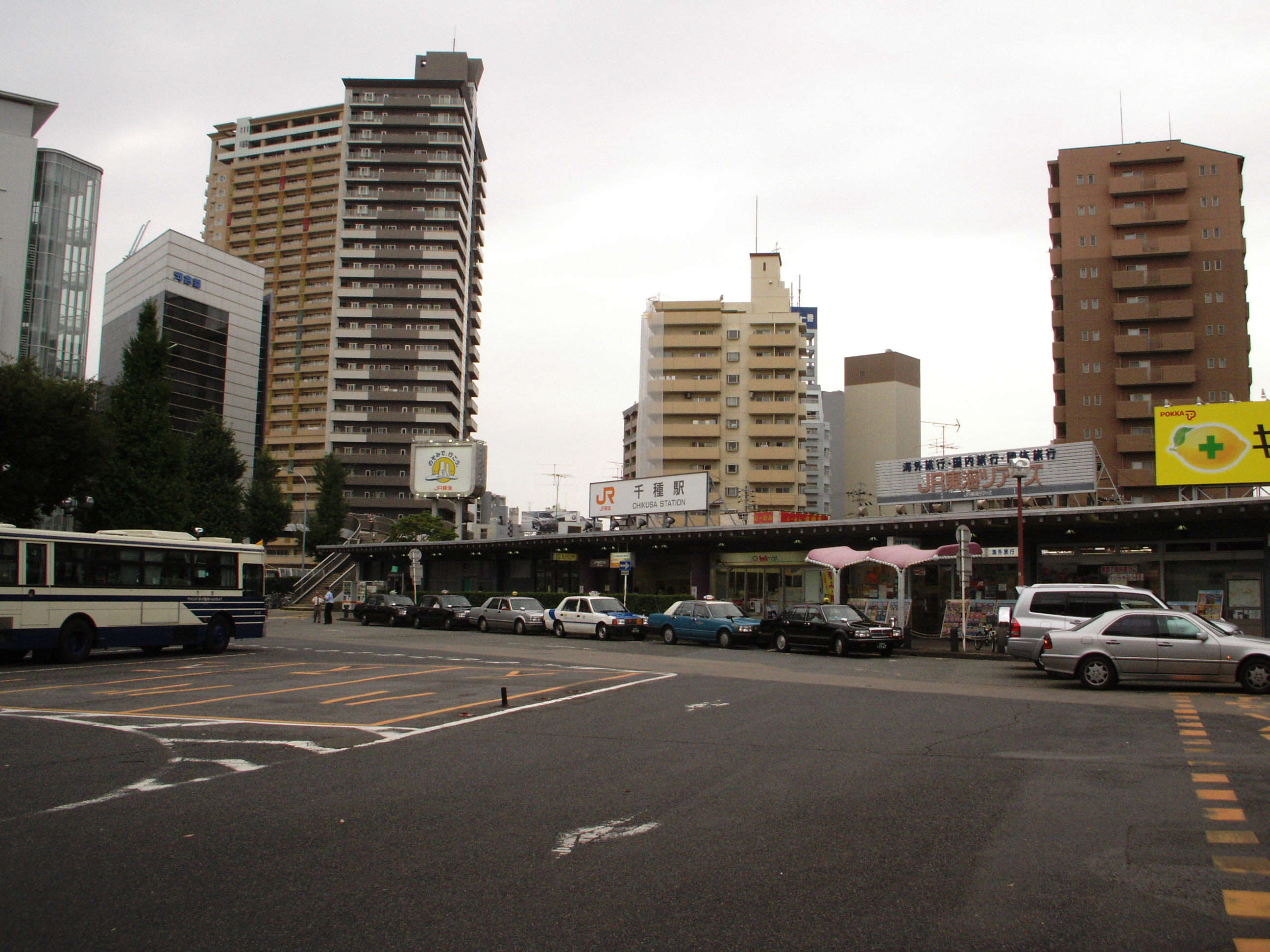 千種駅